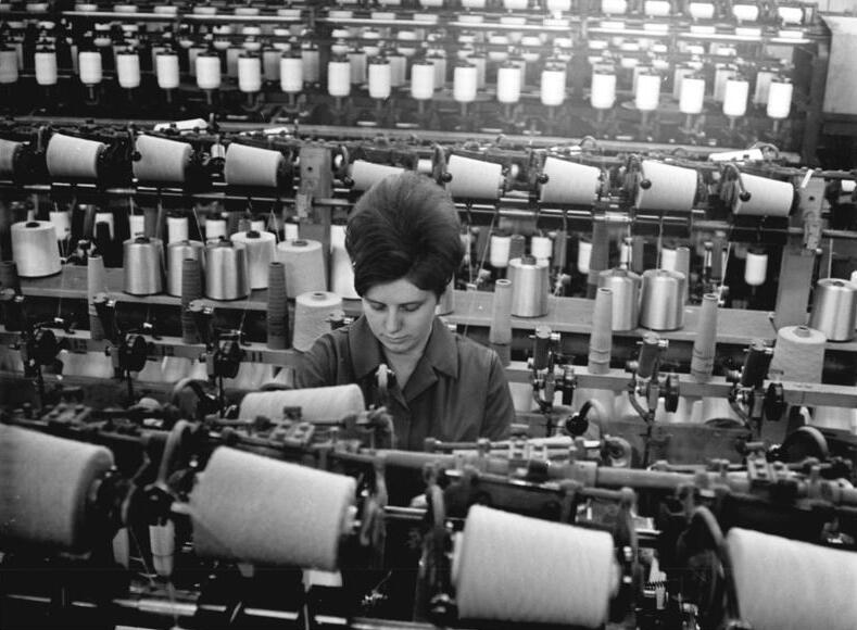 Zentralbild-Häßler 30.03.1970 Bez. Dresden: Kampf um Planerfüllung im Sächsischen Kunstseidenwerk Pirna. 122 Brigaden kämpfen im VEB Kunstseidenwerk "Siegfried Rädel" in Pirna im Rahmen des Leninwettbewerbes um den Titel "Kollektiv der sozialistischen Arbeit". Auch die drei Brigaden des Jugendobjektes -Texturierung - gehören dazu. Textilfaserfacharbeiterin Ursula Sutter arbeitet auf unserem Foto an einer Texturiermaschine. Zusätzlich zu ihrem Kampfprogramm haben sich die Jugendlichen das Ziel gesteckt, durch die Witterungseinflüsse eingetretene Planrückstände schnell aufzuholen."